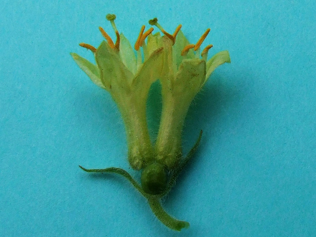 Lonicera caerulea flovers